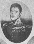 Johann von Fleischmann (1771-1853), geadelter bayerischer Generalmajor